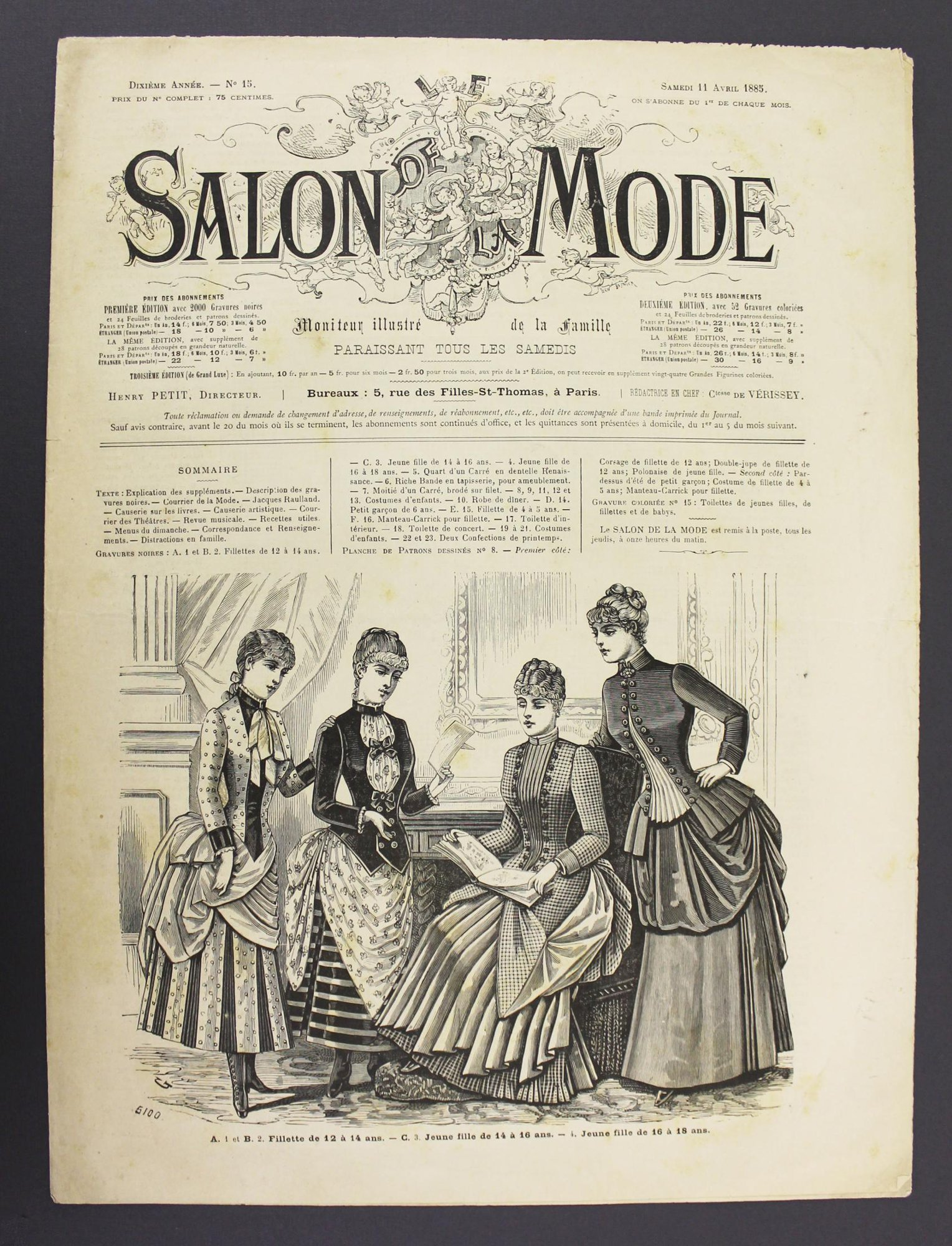 Salon De La Mode (Samedi 11 Avril 1885)